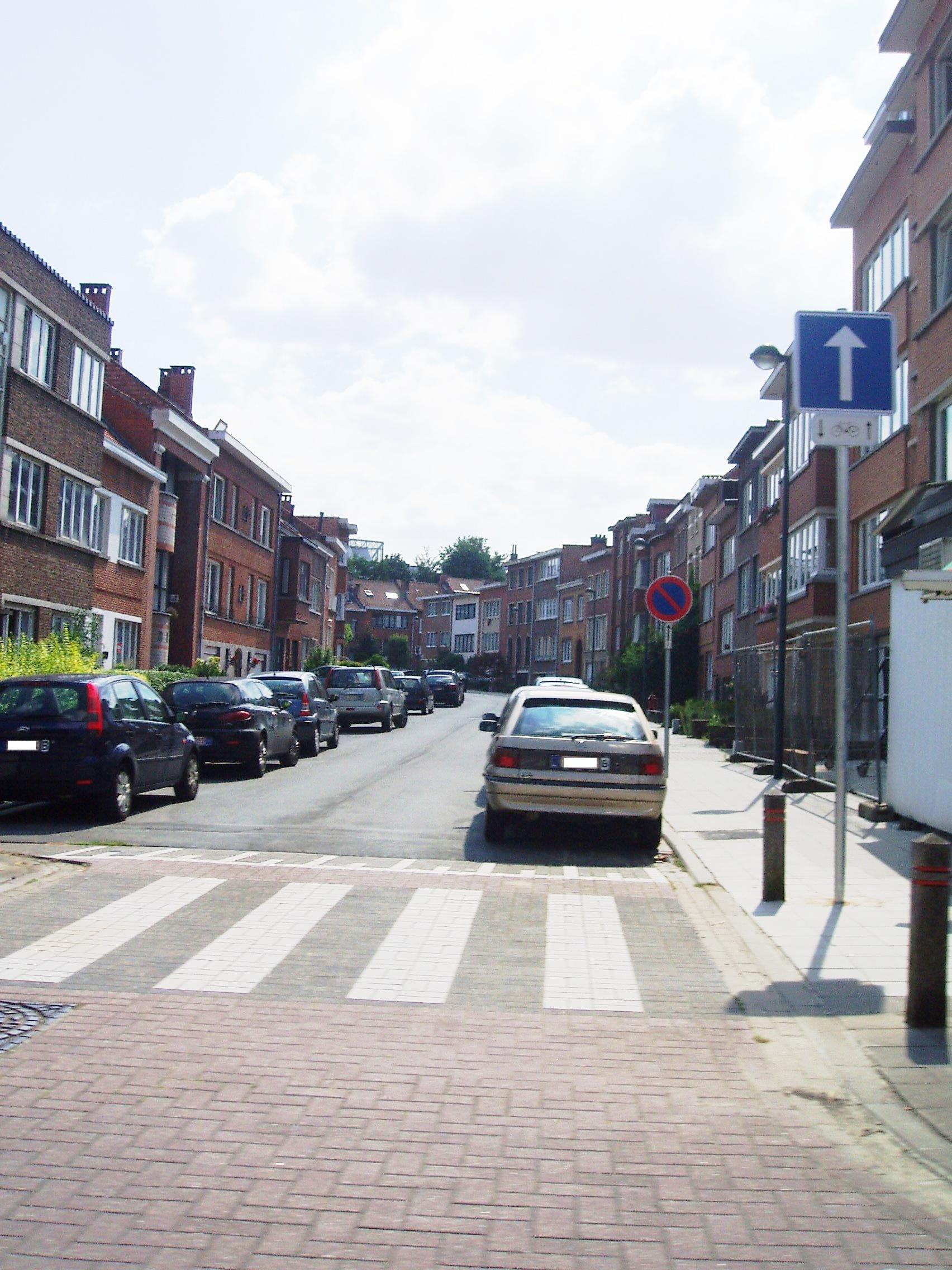 avenue Auguste Oleffe Auderghem Belgium